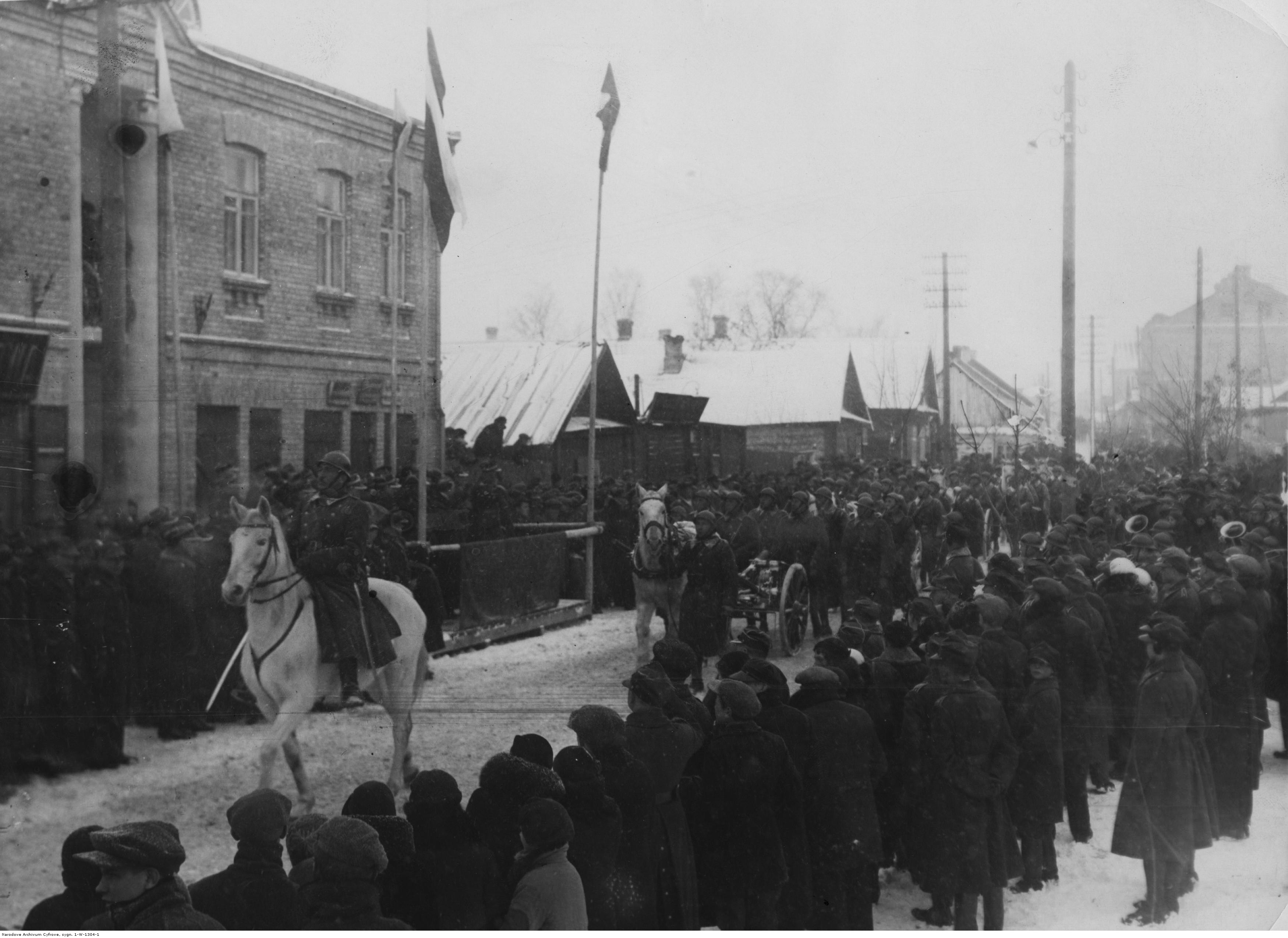 Święto 77 pułku piechoty w Lidzie - defilada pułku wśród tłumu mieszkańców; luty 1937. Koncern Ilustrowany Kurier Codzienny - Archiwum Ilustracji. Sygnatura: 1-W-1304-1